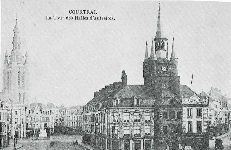 Belfort van Kortrijk met rondom woningen en handelzaken - Kortrijk - West-Vlaanderen - België